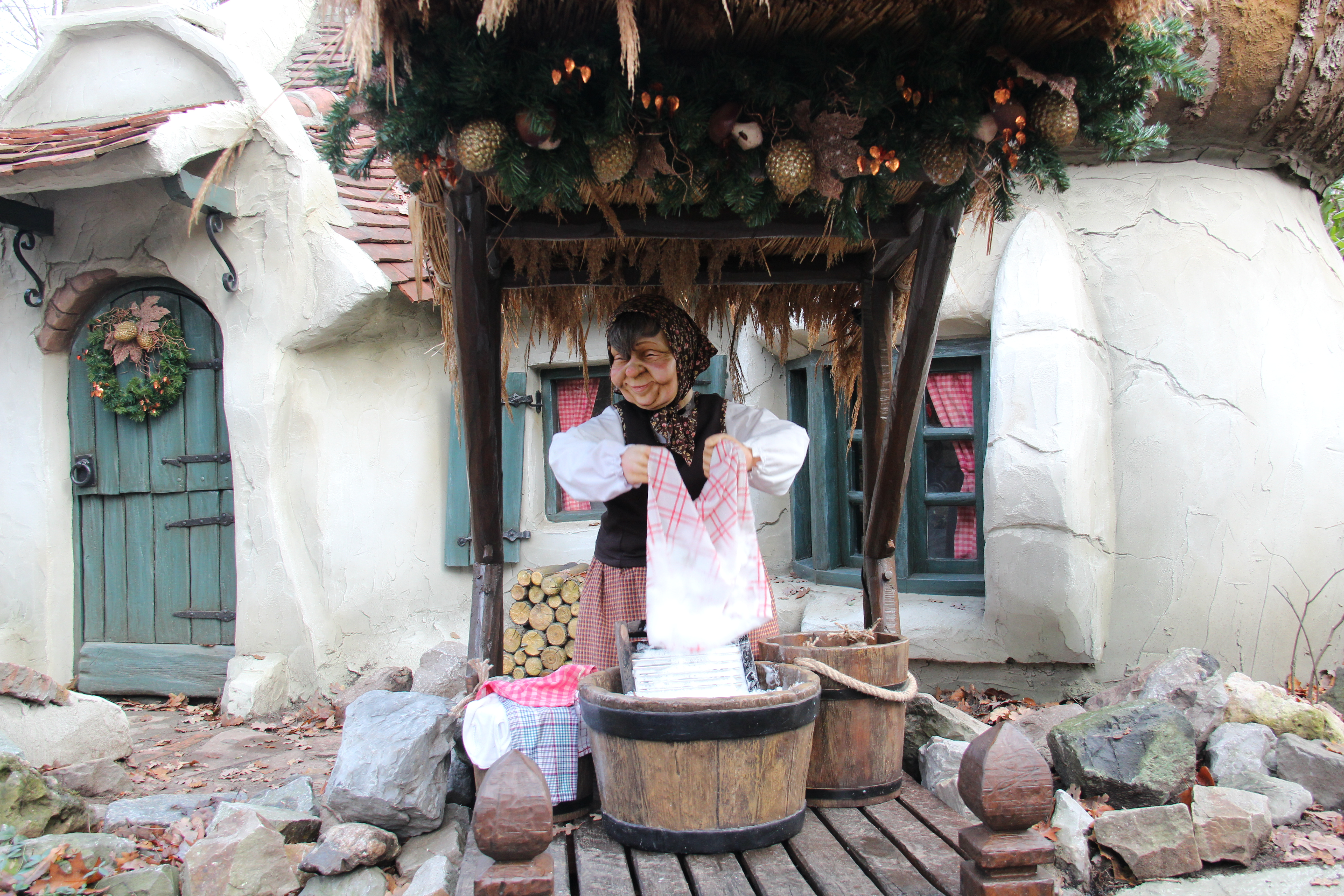 het wasvrouwtje in het kabouterdorp